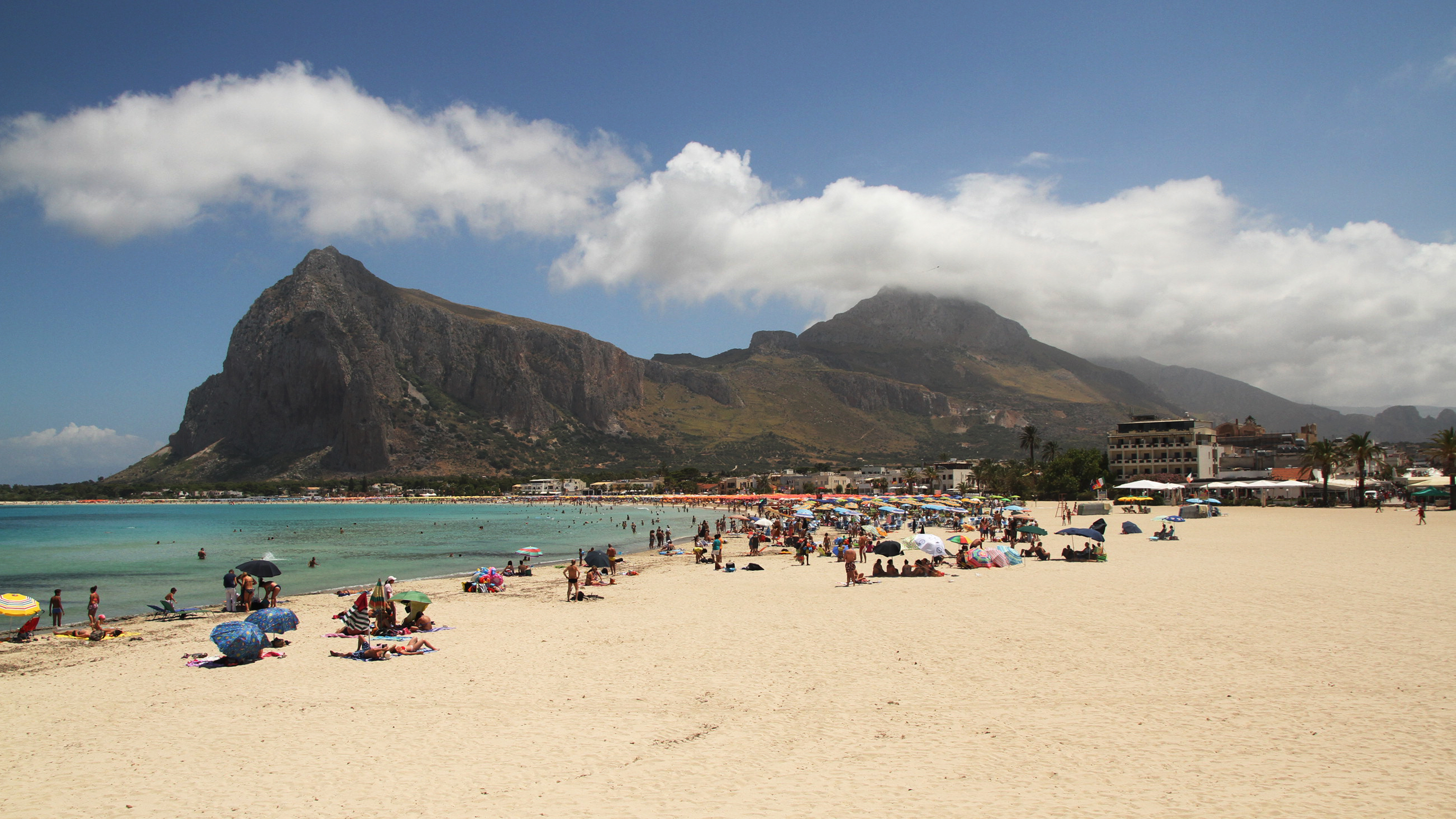 91010 San Vito Lo Capo TP, Italy